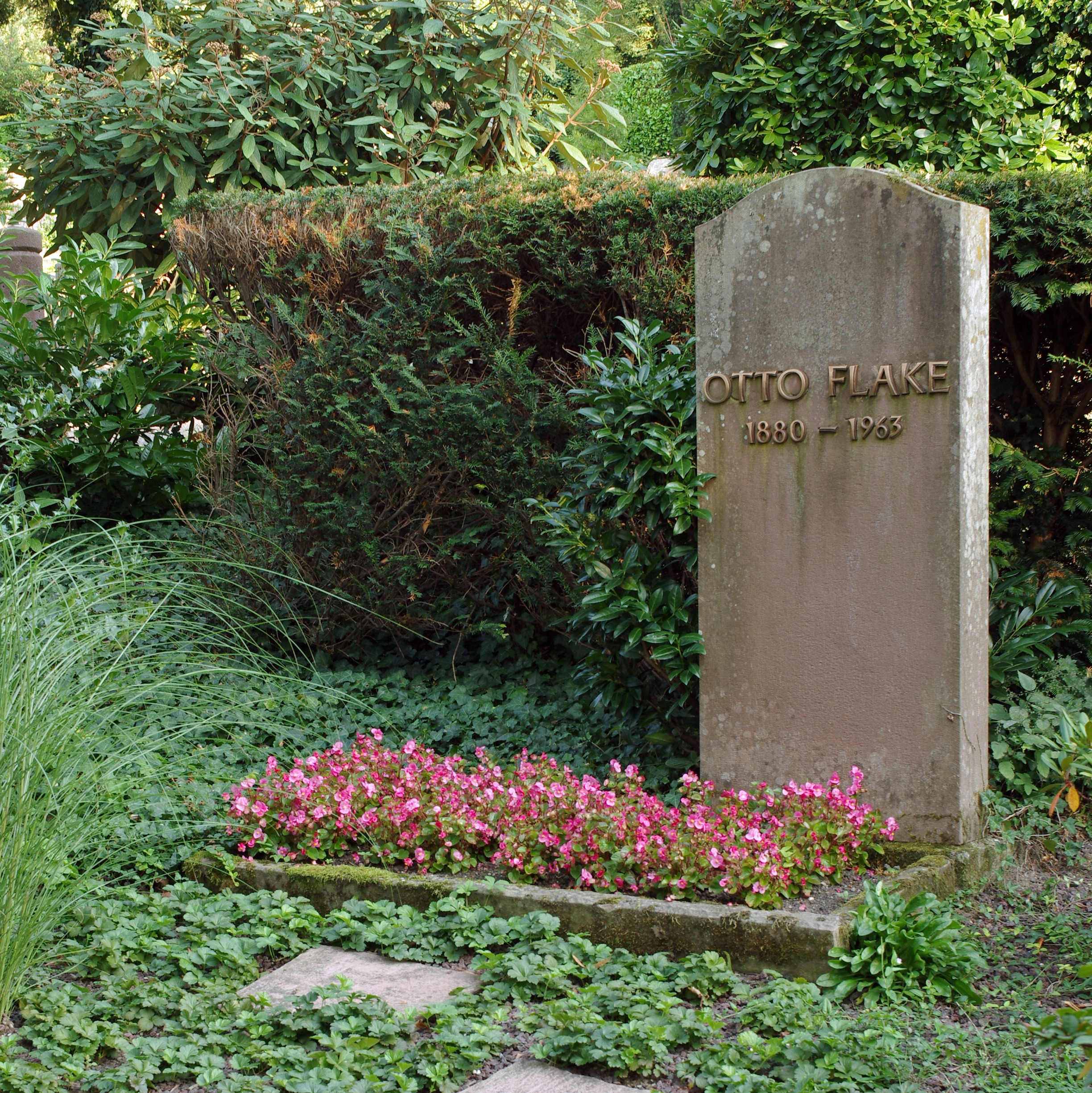 Grabmal Otto Flake auf dem Hauptfriedhof Baden-Baden